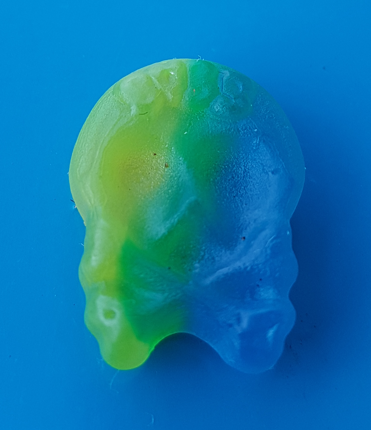 Vinnarskalle från Bubs (specialutgåva i samband med VM i fotboll 2018)